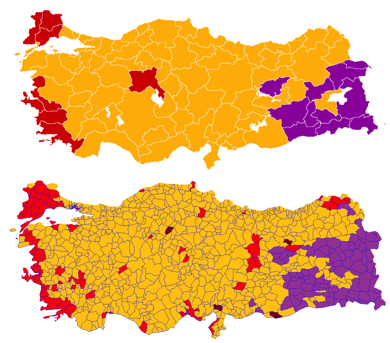 Parlamentswahl 2018 in der Türkei Karte